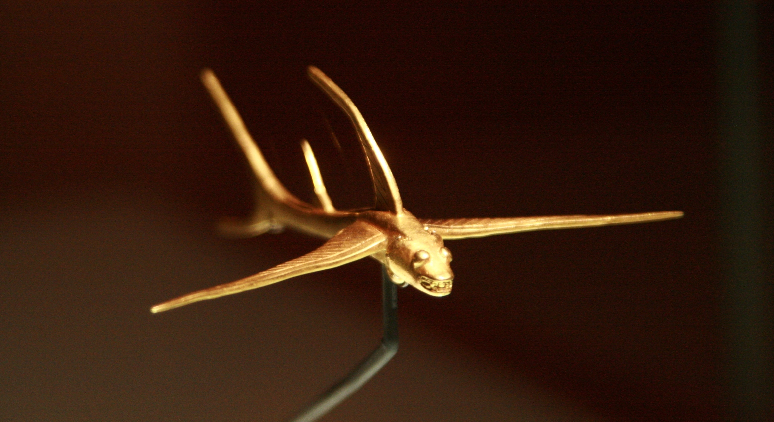 Pendant Gold 0 - A.D. 900 San Agustín, Huila 3,1 x 9,7 x 8,8 cm Reference: Museo del Oro, Bogotá